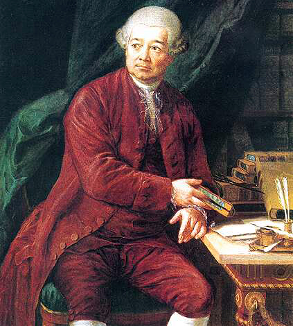 Adam František Kollár 1779 (aged 61)